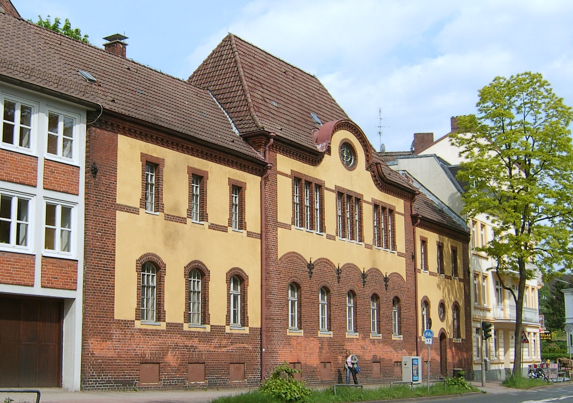 Das Gefängnis hinter dem Amtsgericht Wandsbek wurde wie das Gerichtsgebäude selbst 1909/10 von P. Thömer erbaut.